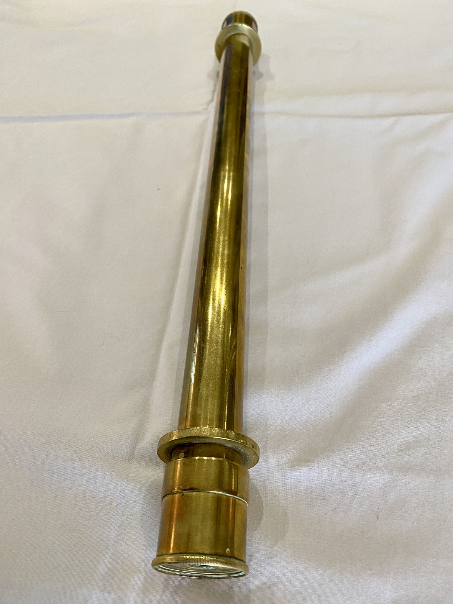 Tube permettant de mesurer la Vincent en sucre d’une solution aqueuse